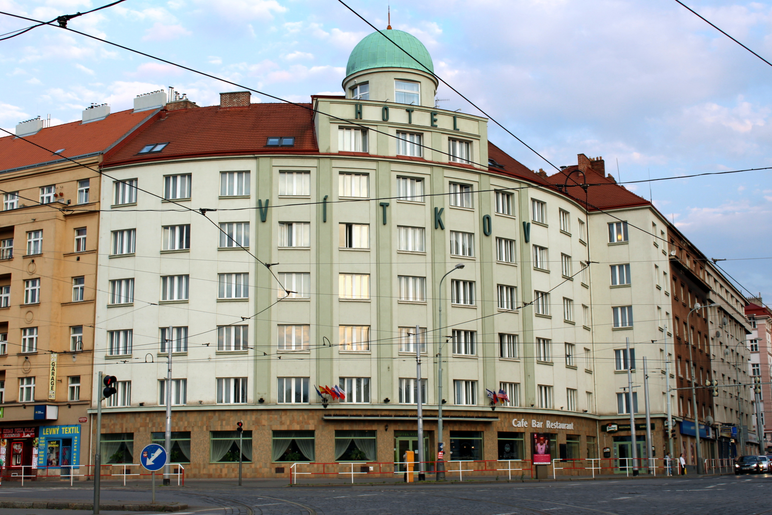 hotel Vítkov na Ohradě-Žižkov